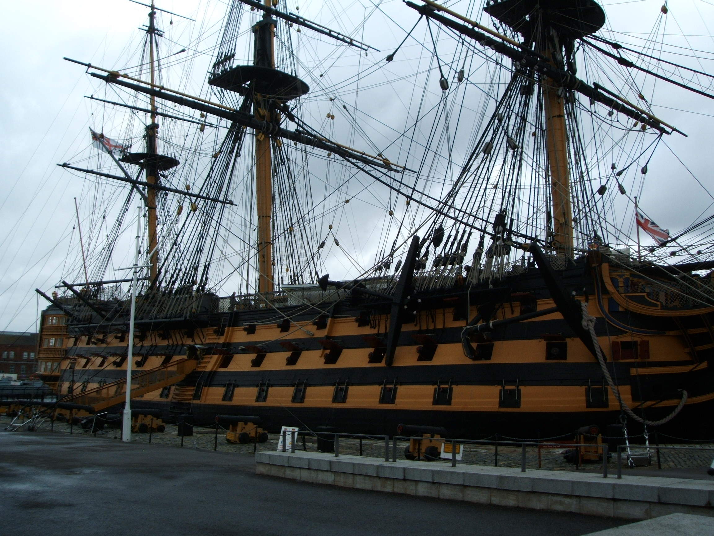 Schachbrettanordnung der Stückpforten des Linienschiffes HMS Victory